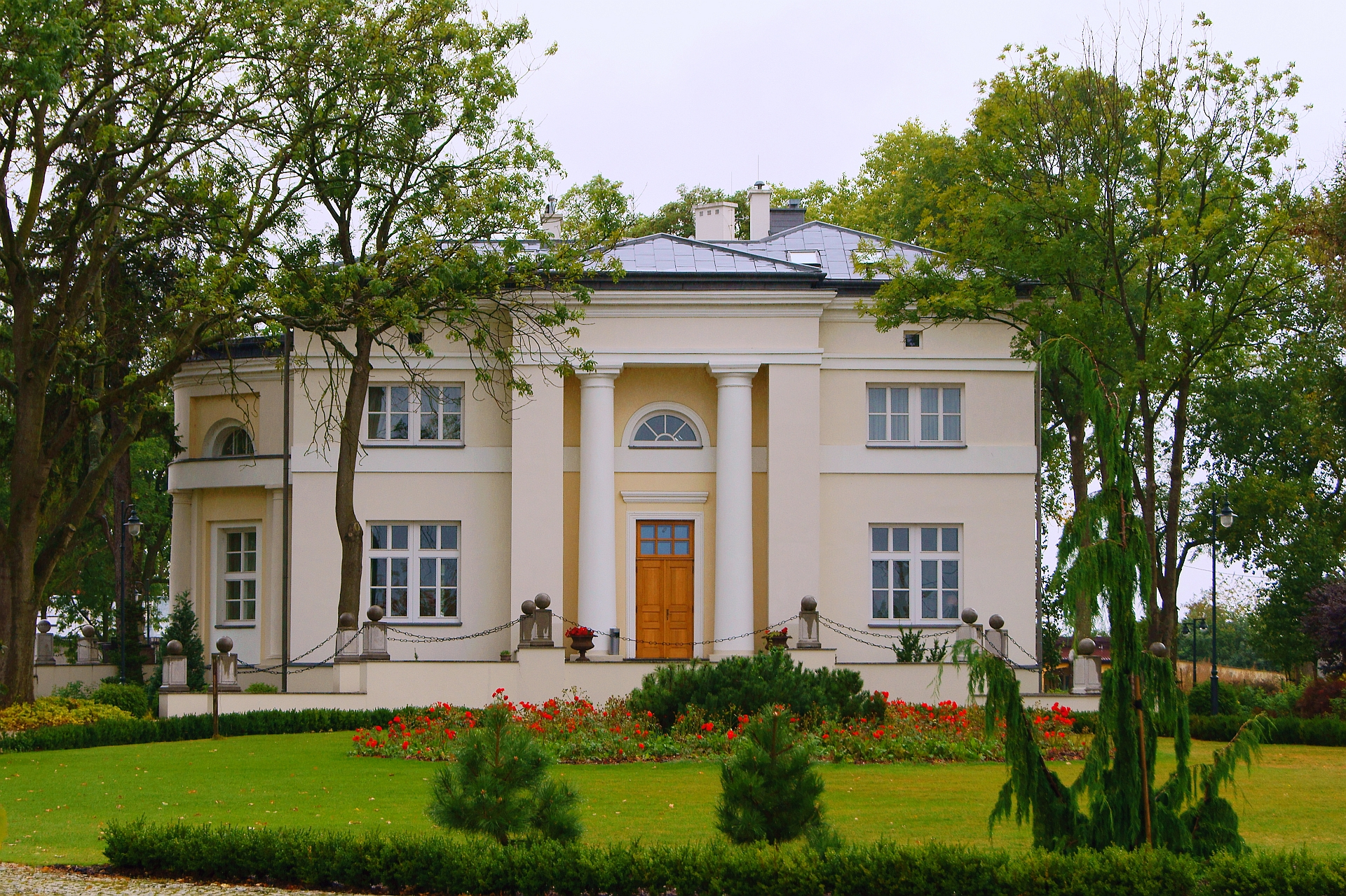 Smólsk - pałac, 1 ćw. XIX, k. XIX